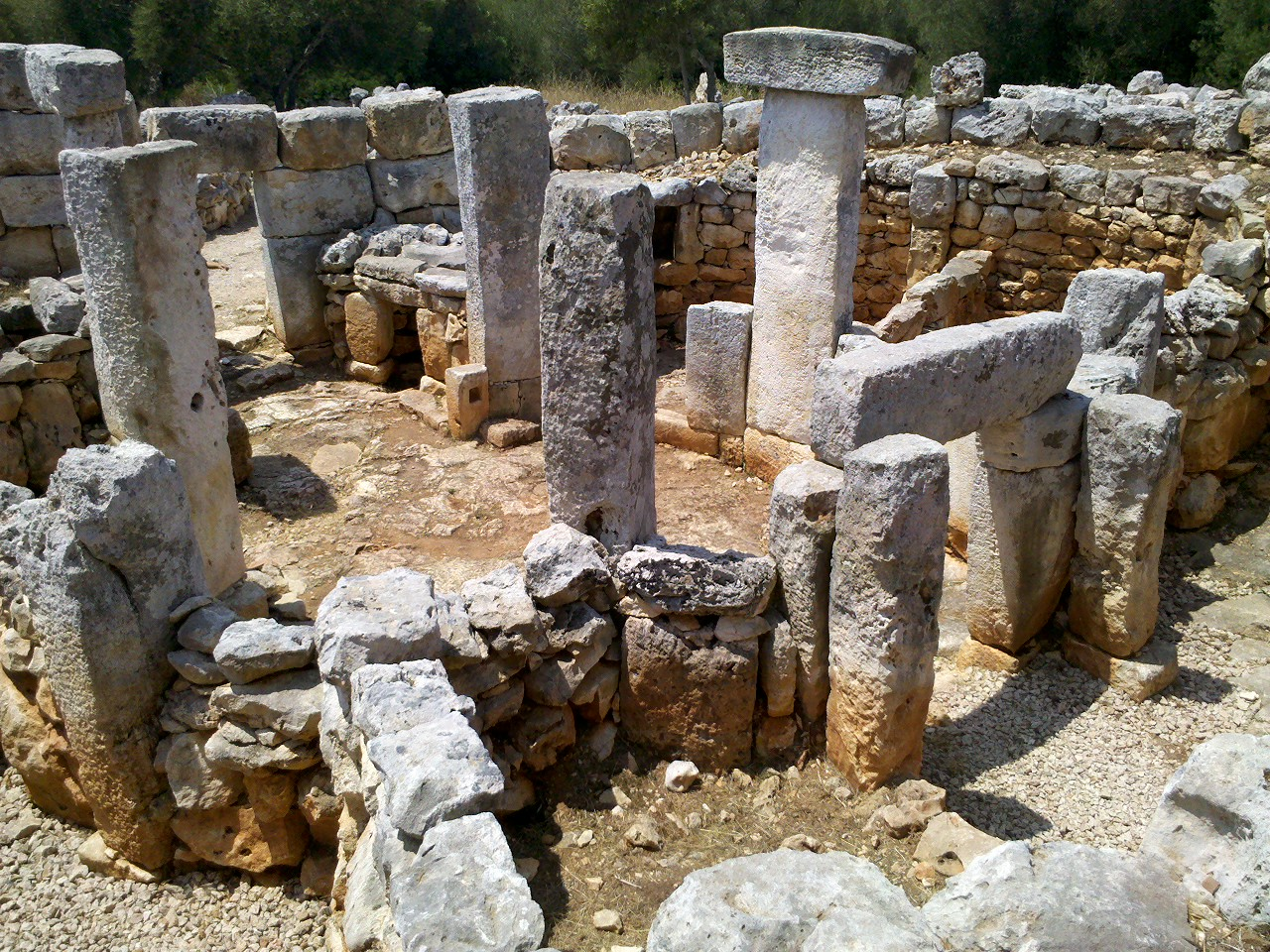 poblat talaiotic Menorca